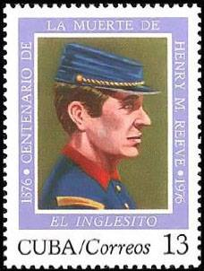 Kubanische Briefmarke von 1976